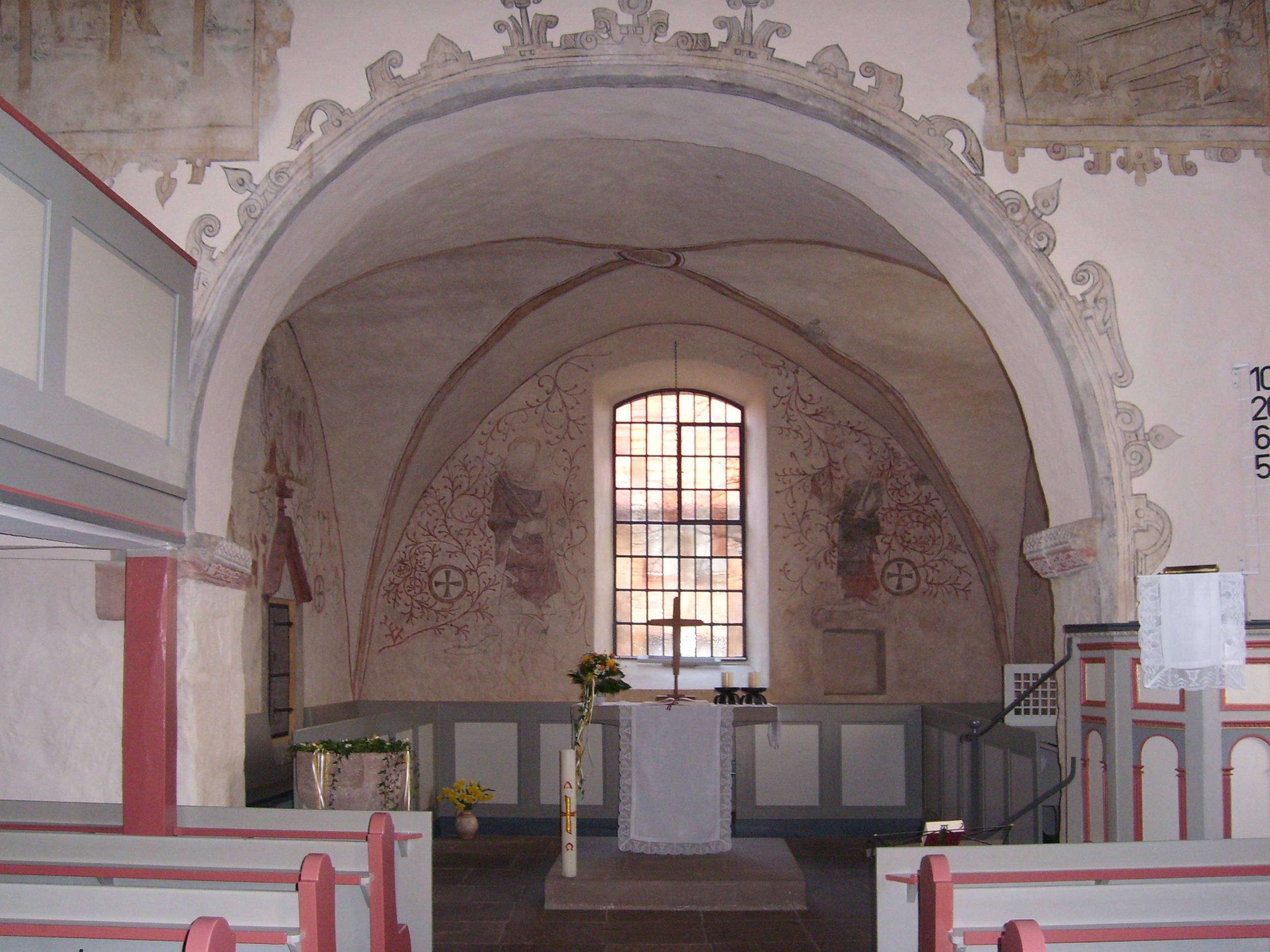 Blick in den Altarraum der St. Margarethenkirch (Vernawahlshasusen).